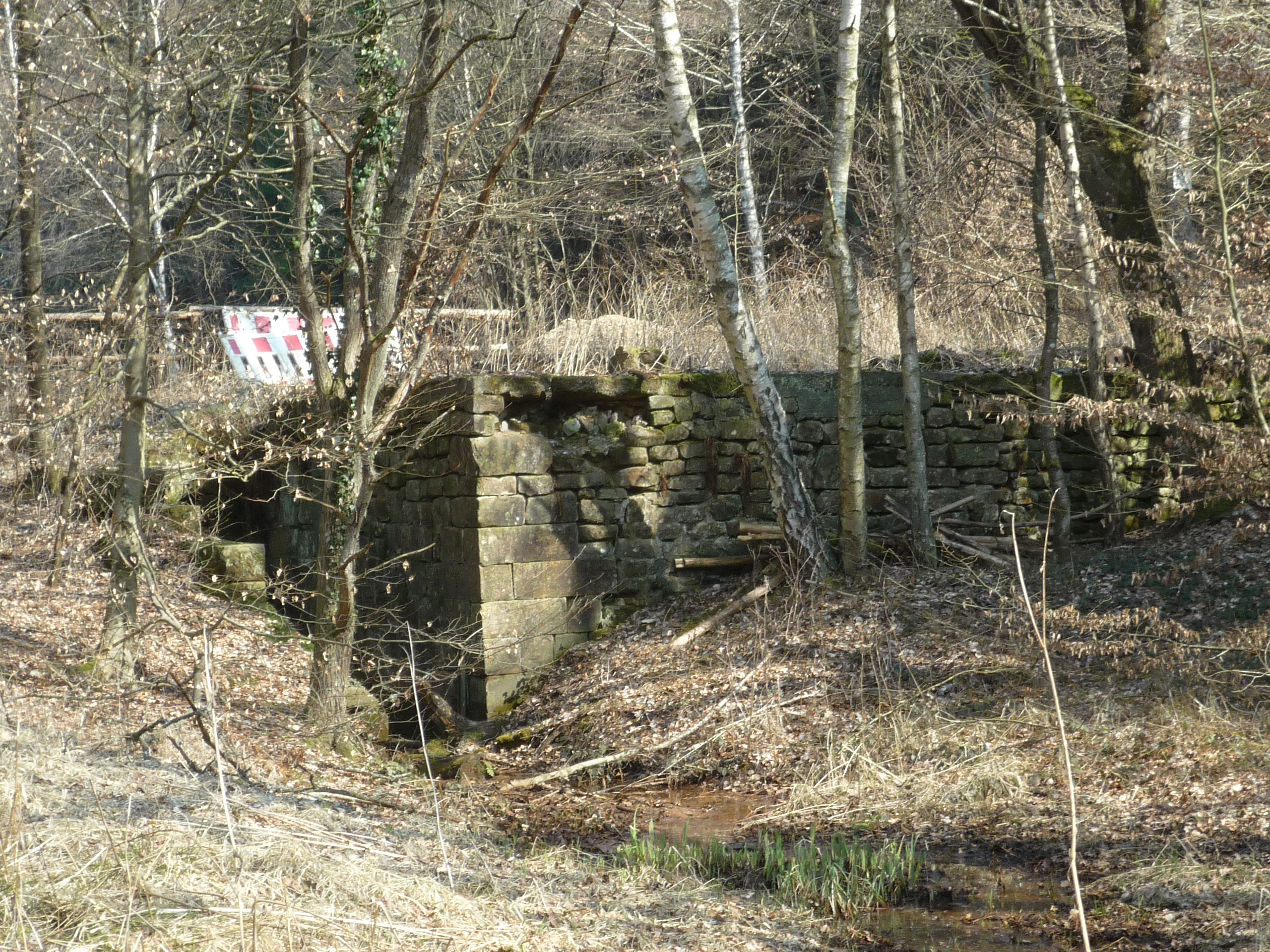 Fundament eines ehemaligen Bauwerks am Saegeweiher